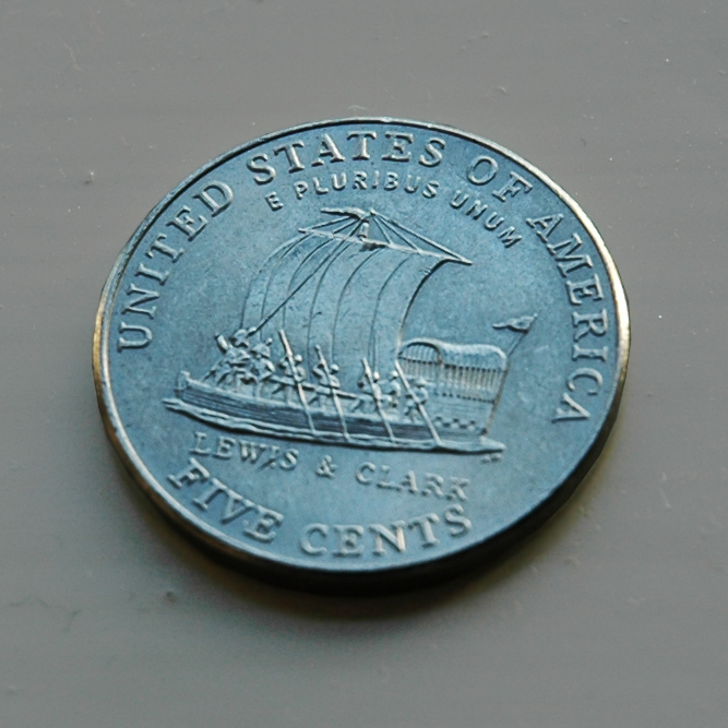 Een Amerikaanse 5 cent met daarop de expeditie van Lewis en Clark